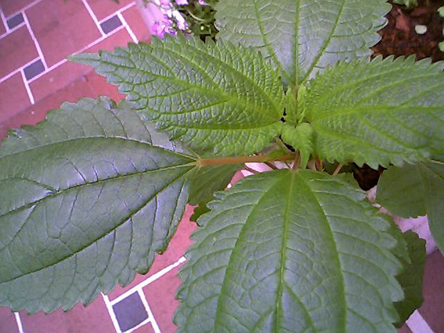 Calea zacatechichi